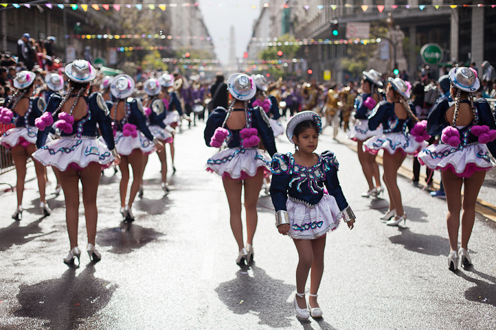 Fotos del desfile por la Integracion Cultural de la comunidad boliviana en Buenos Aires, Argentina (2015)